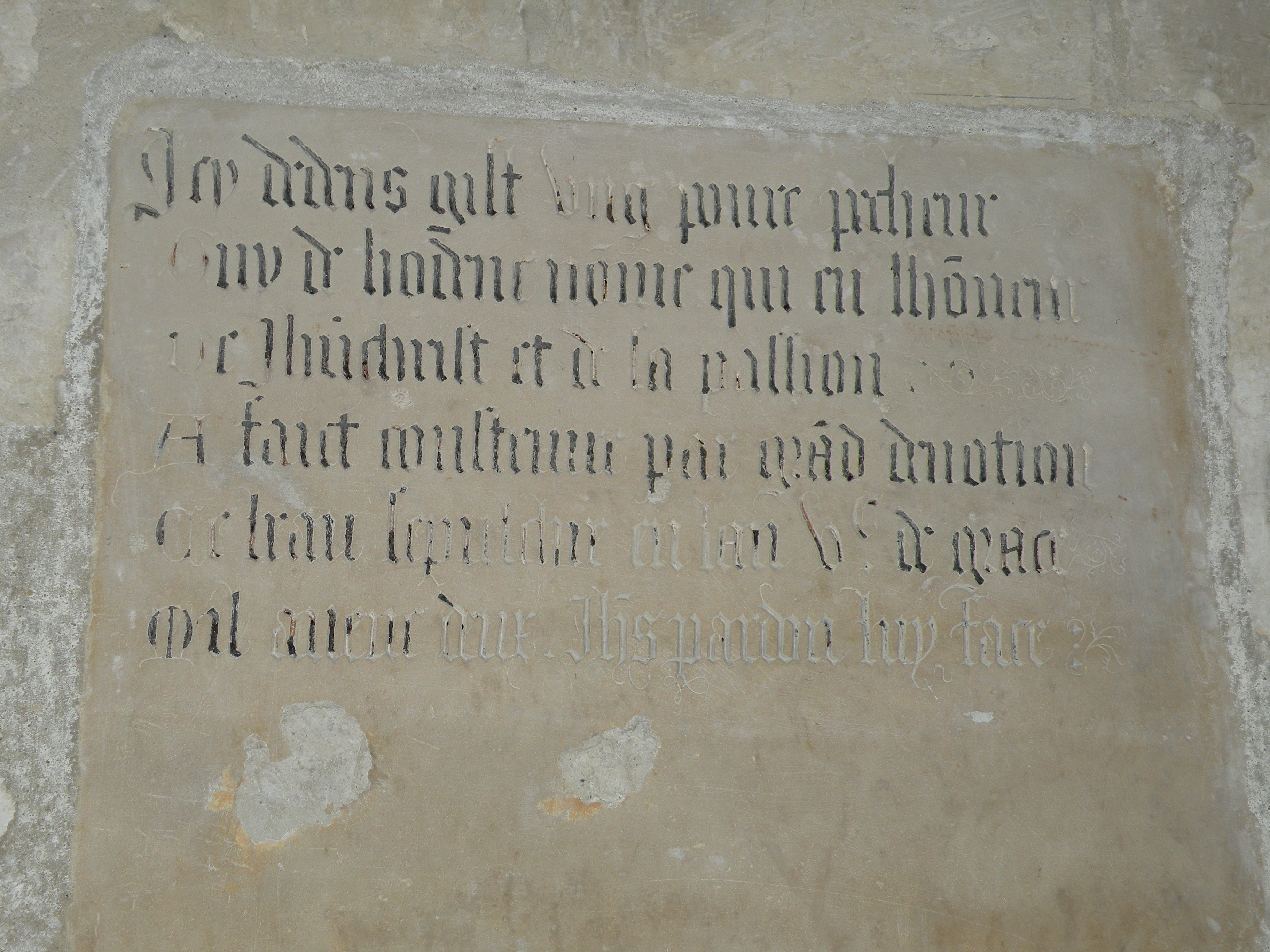 inscription sur le mur du baptistère.